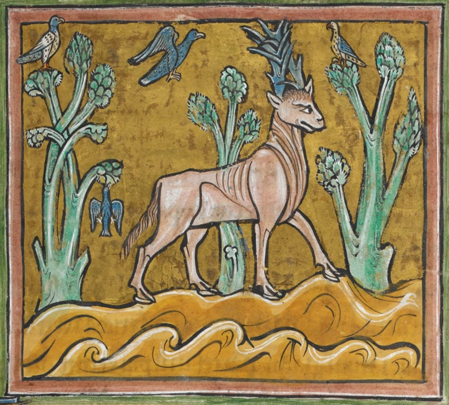 Parandrus - detail of a miniature from the Rochester Bestiary, BL Royal 12 F xiii